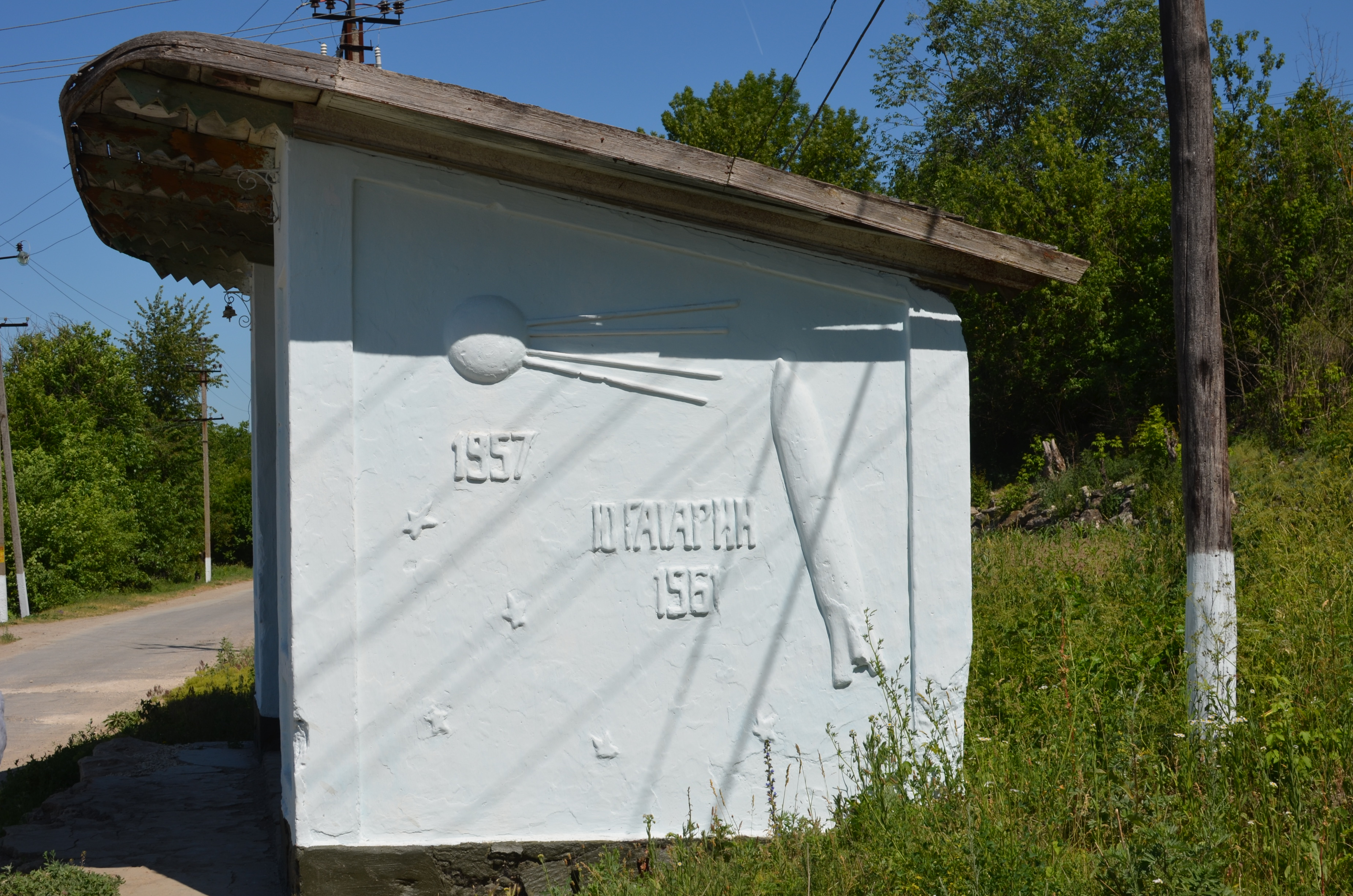 с. Юрківці. Автобусна зупинка поблизу залізничної станції.